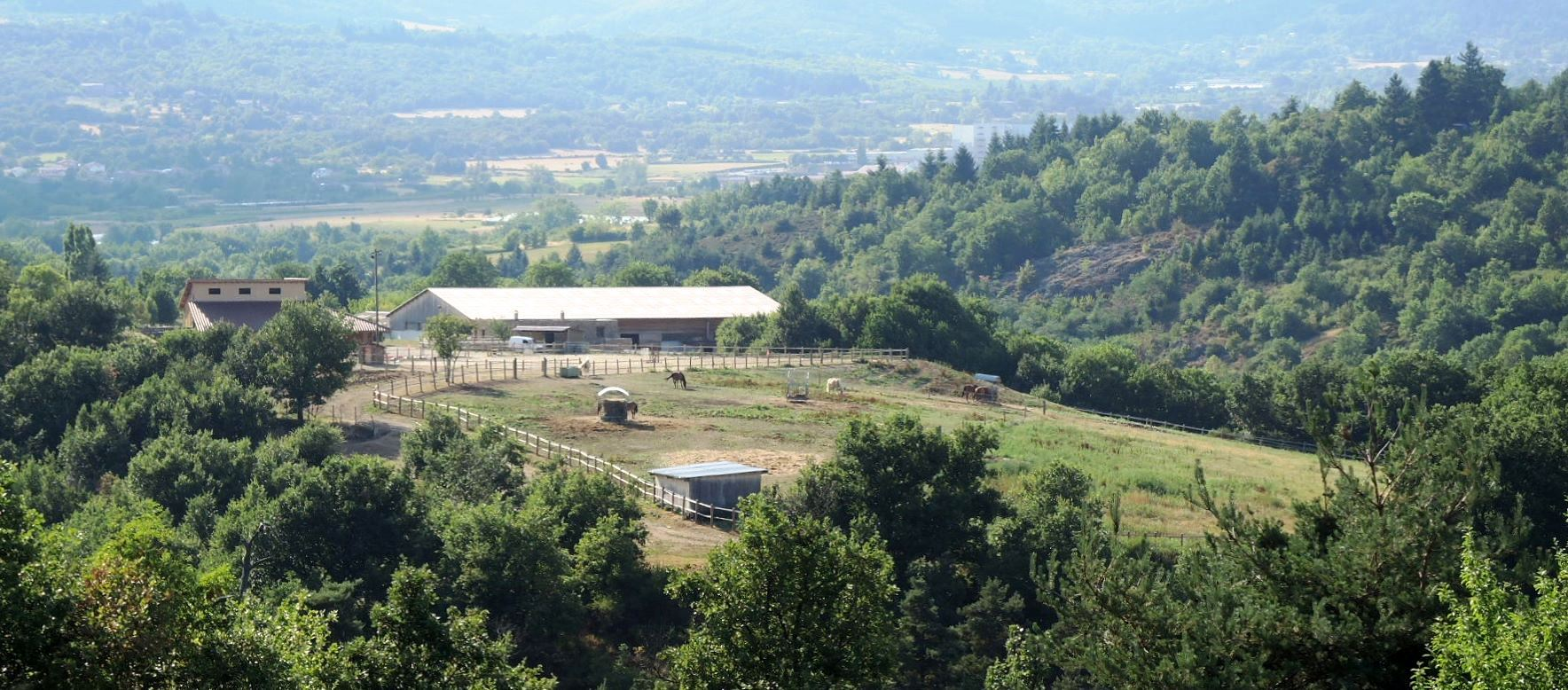 Saint-Jacques-d'Atticieux détail